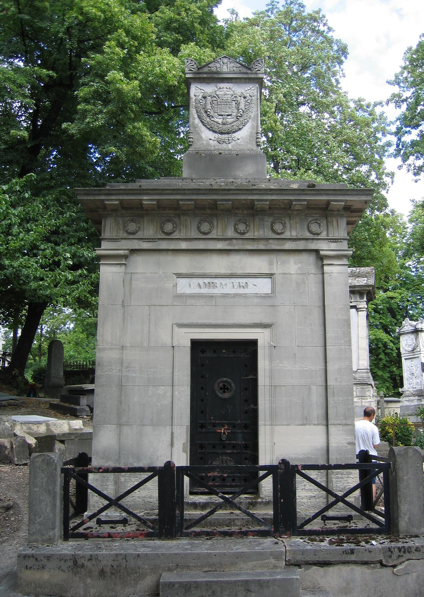 Tombeau de Cambacérès